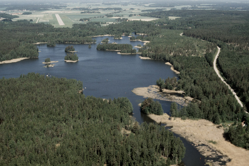 Hjälmare kanal vid Kvarnsjön. Bilden är tagen mot (väderstreck): NNV Motiv: Kvarnsjön Nyckelord: Flygbilder, Riksintressen Kategori: Insjömiljöer, Kanalanläggning Hjälmare kanal vid Kvarnsjön. Bilden är tagen mot (väderstreck): NNV.